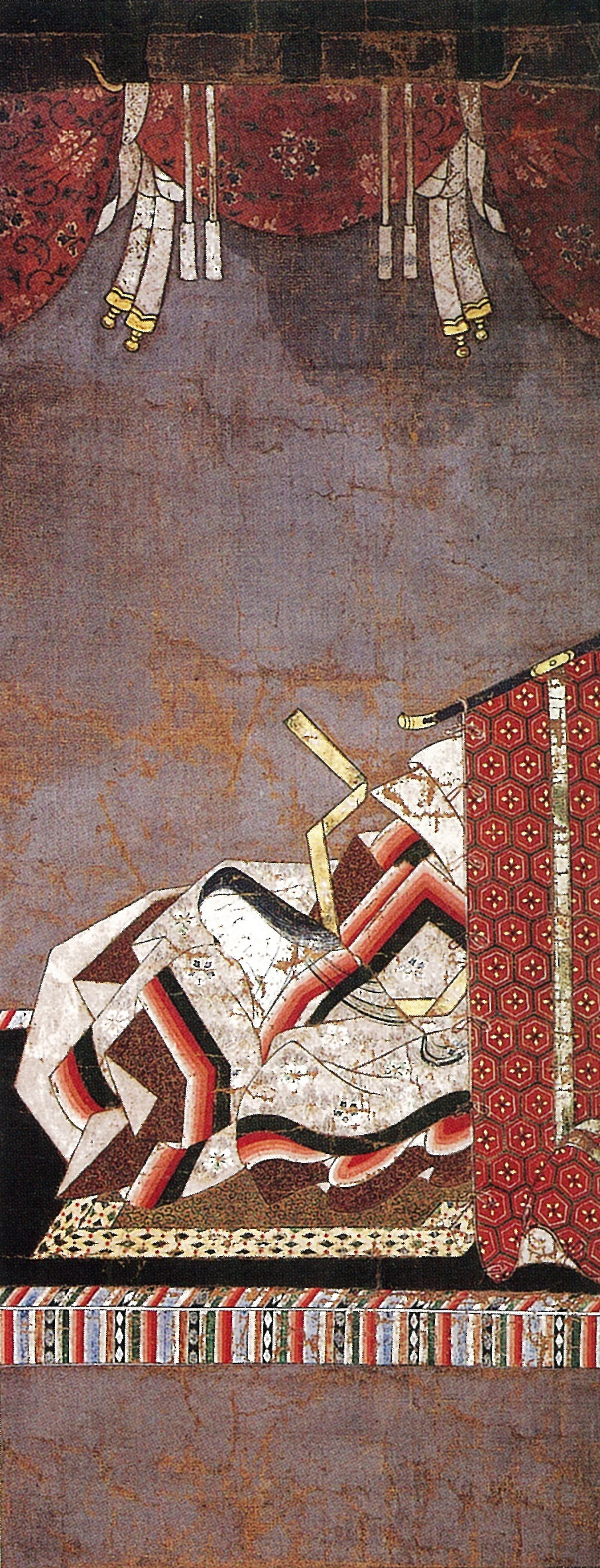 美福門院（藤原得子）。鳥羽上皇の皇后。